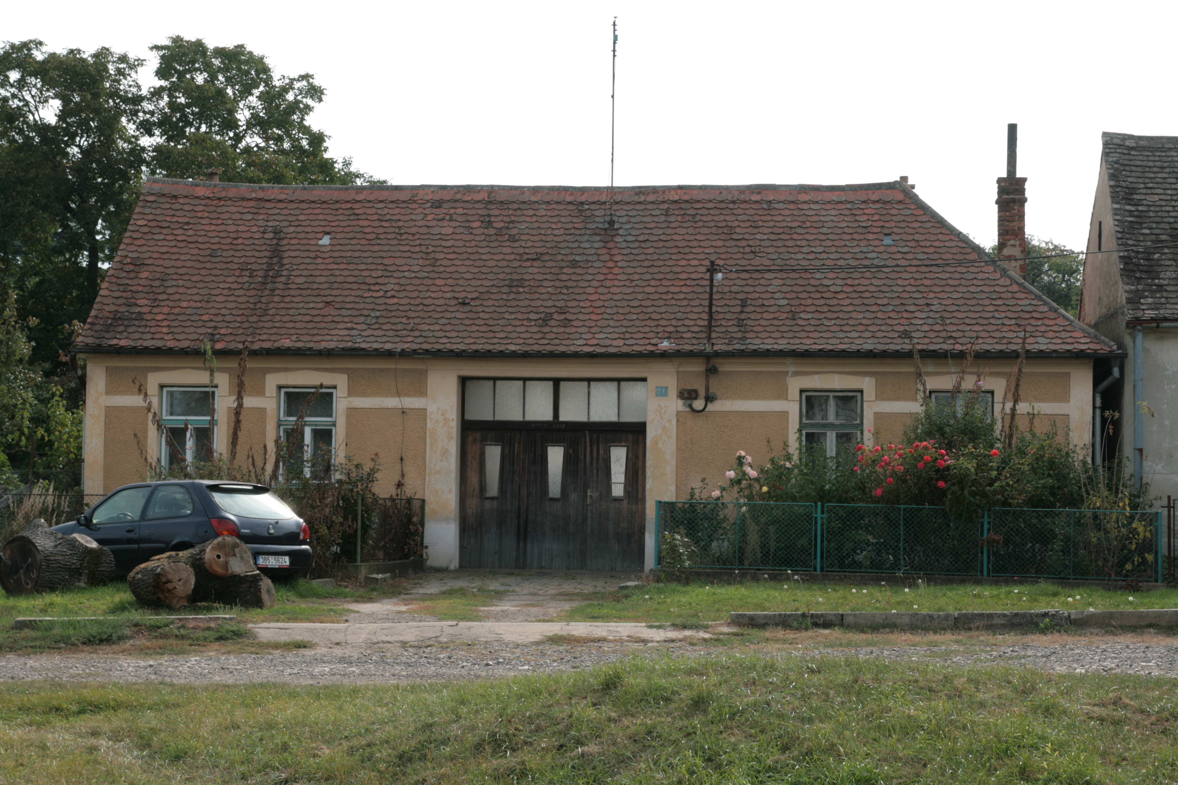 Osada Hnízdo, část obce Vrbovec v okrese Znojmo. Dům č. 24 u autobusové zastávky.